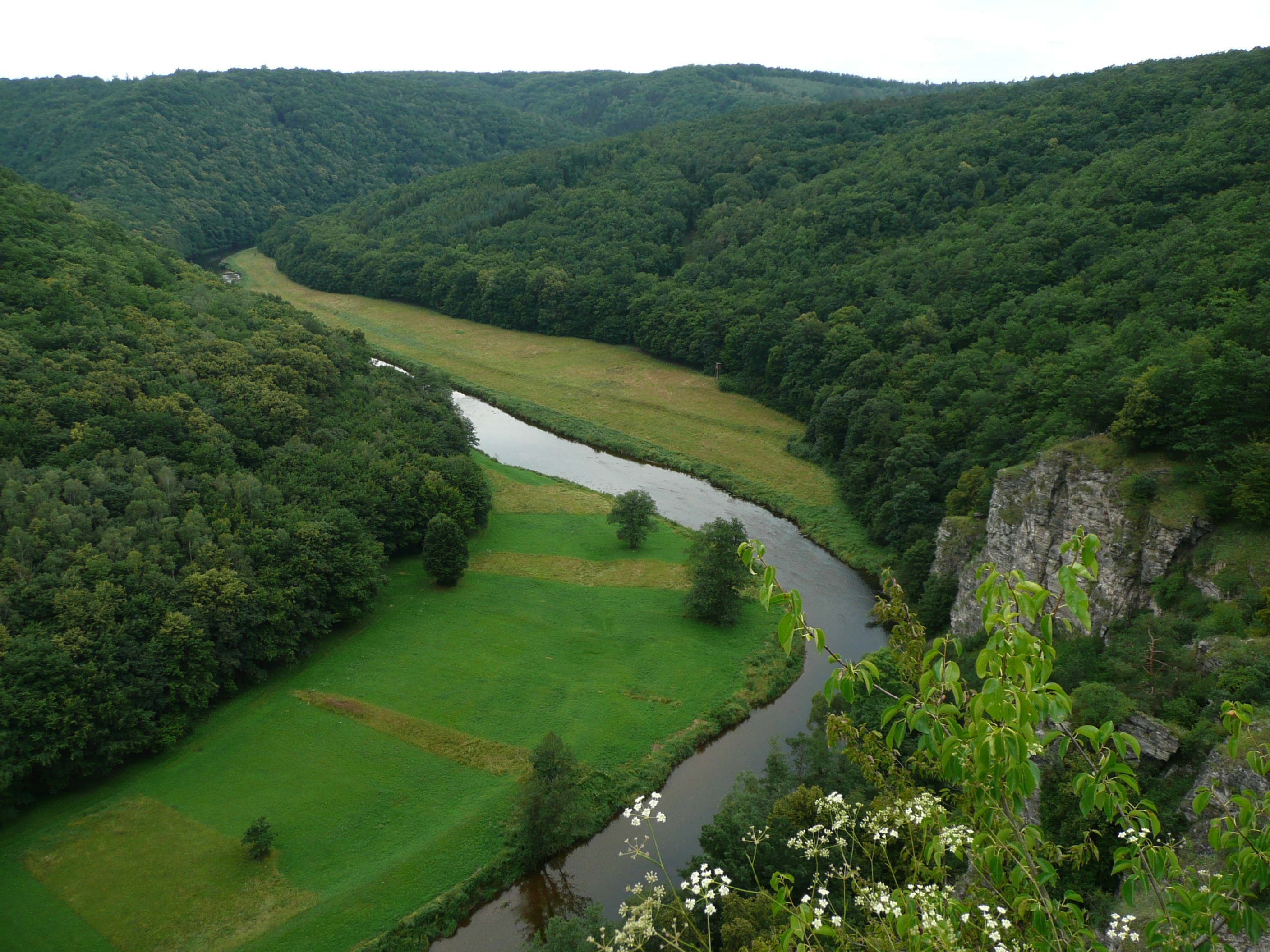 Kaňon Dyje pod Vraní skalou, NP Podyjí.